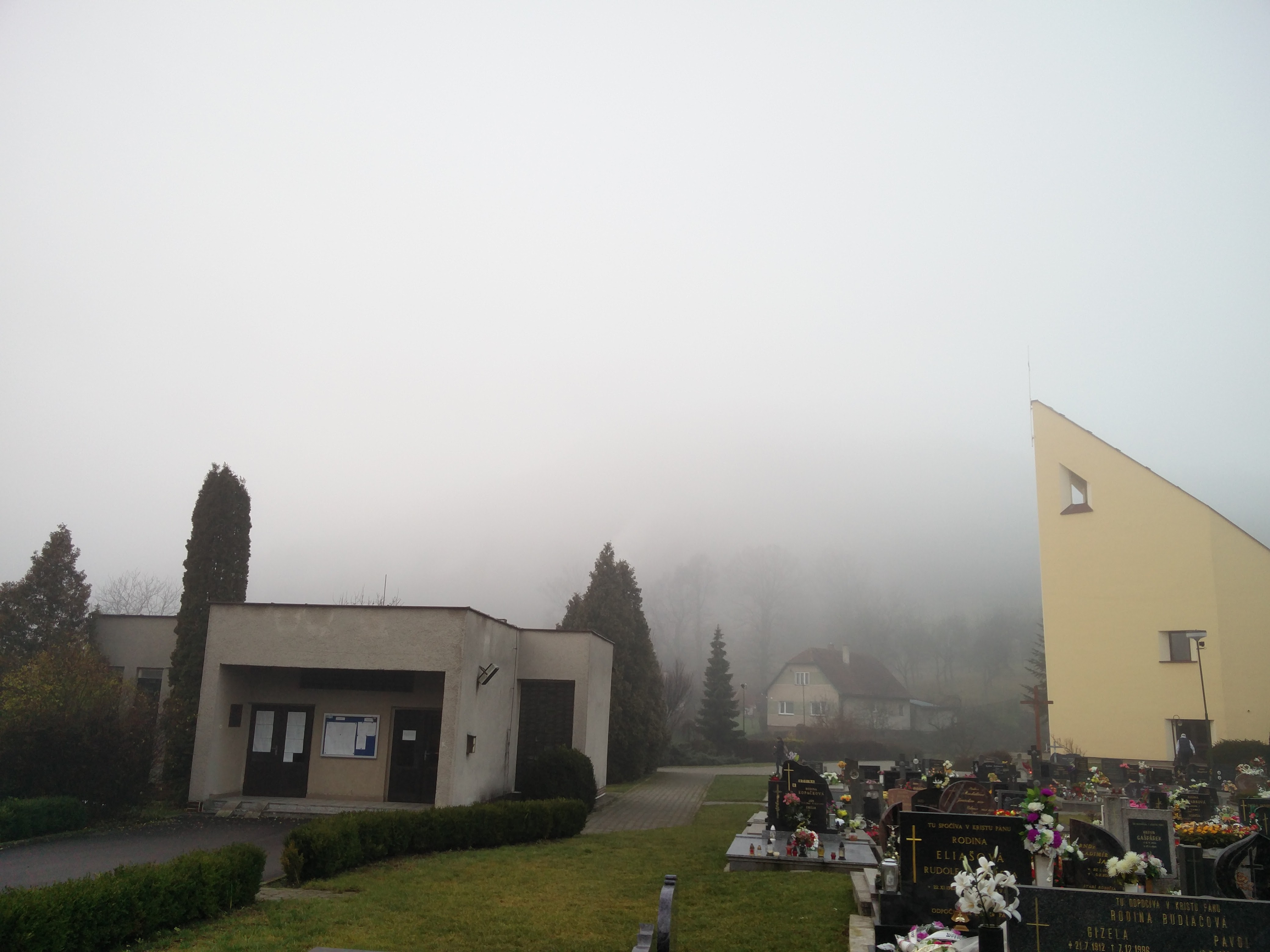 Kostol sv. Gorazda a dom smútku